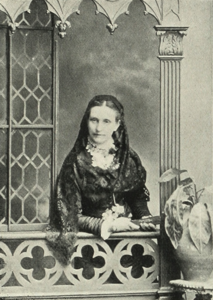 Maria Elise Turner Lauder